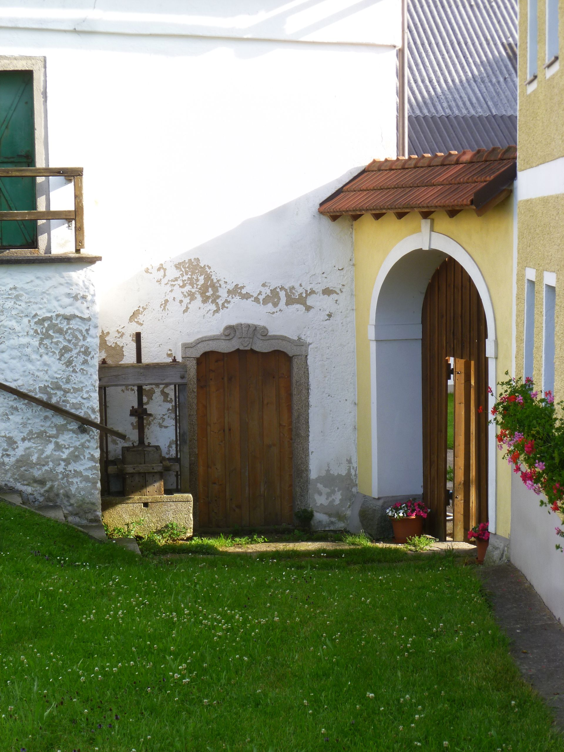 Edelsitz Katzbrenning (heute Bauernhof)